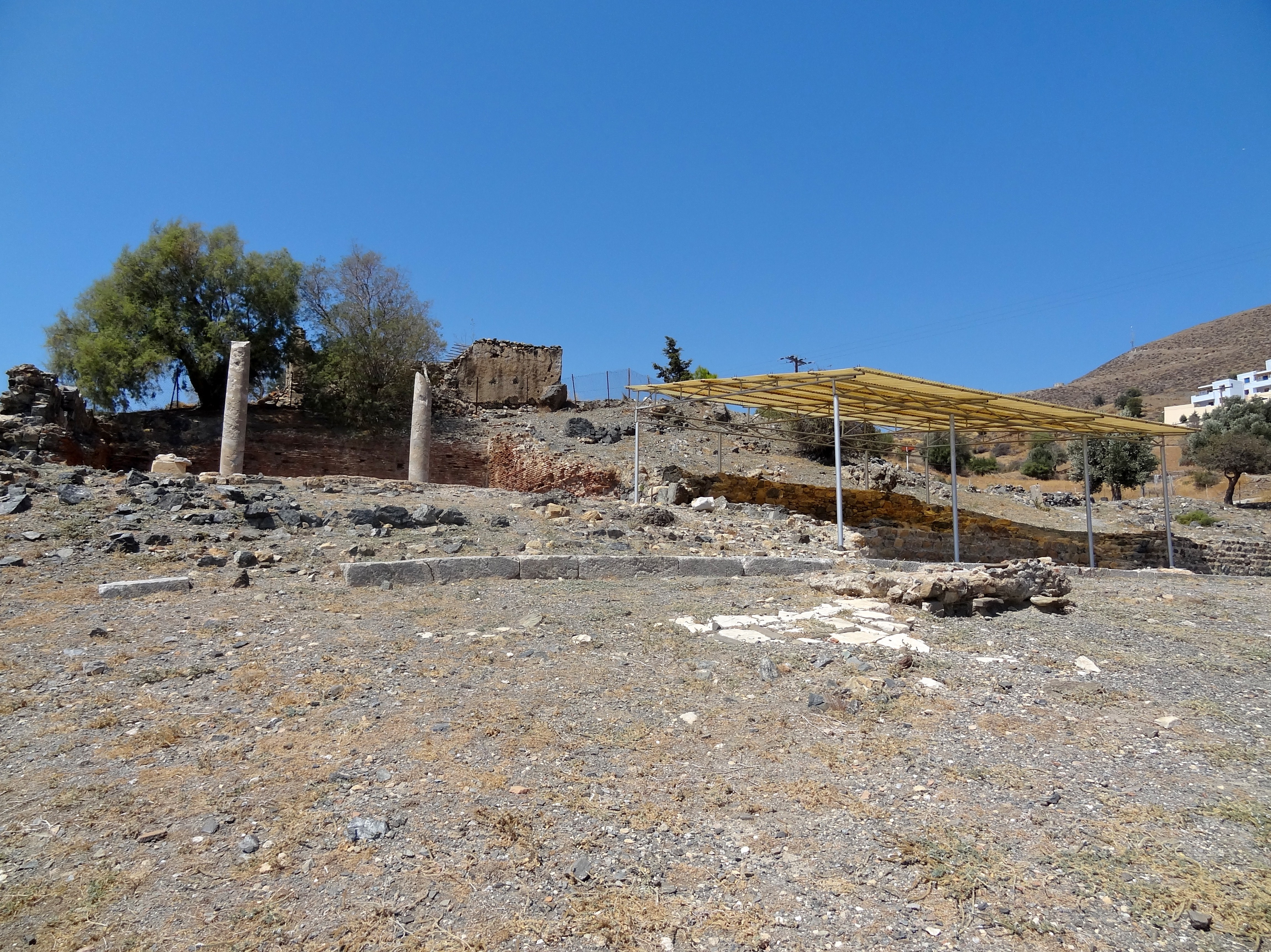 Blick auf das Asklepios-Heiligtum des antiken Leben (Λεβήν) in Lendas, Gemeinde Gortyna, Regionalbezirk Iraklio, Kreta, Griechenland